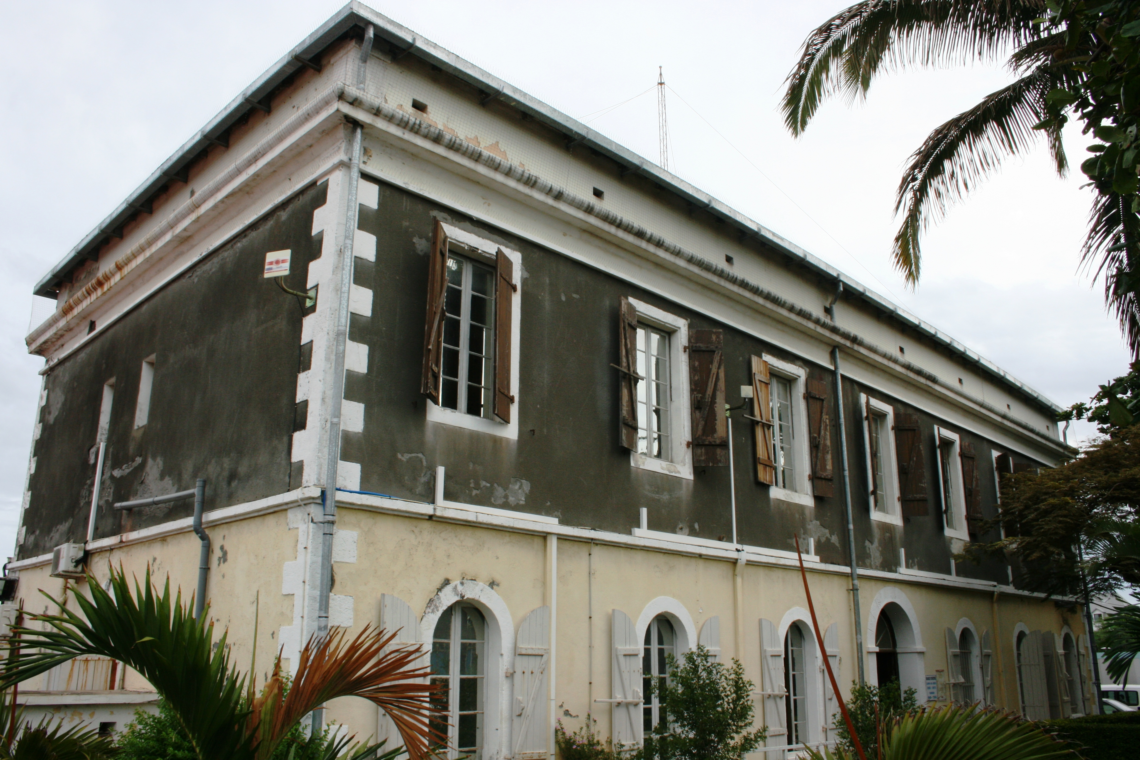 L'ancienne gendarmerie de Saint-Pierre, à Saint-Pierre de La Réunion.